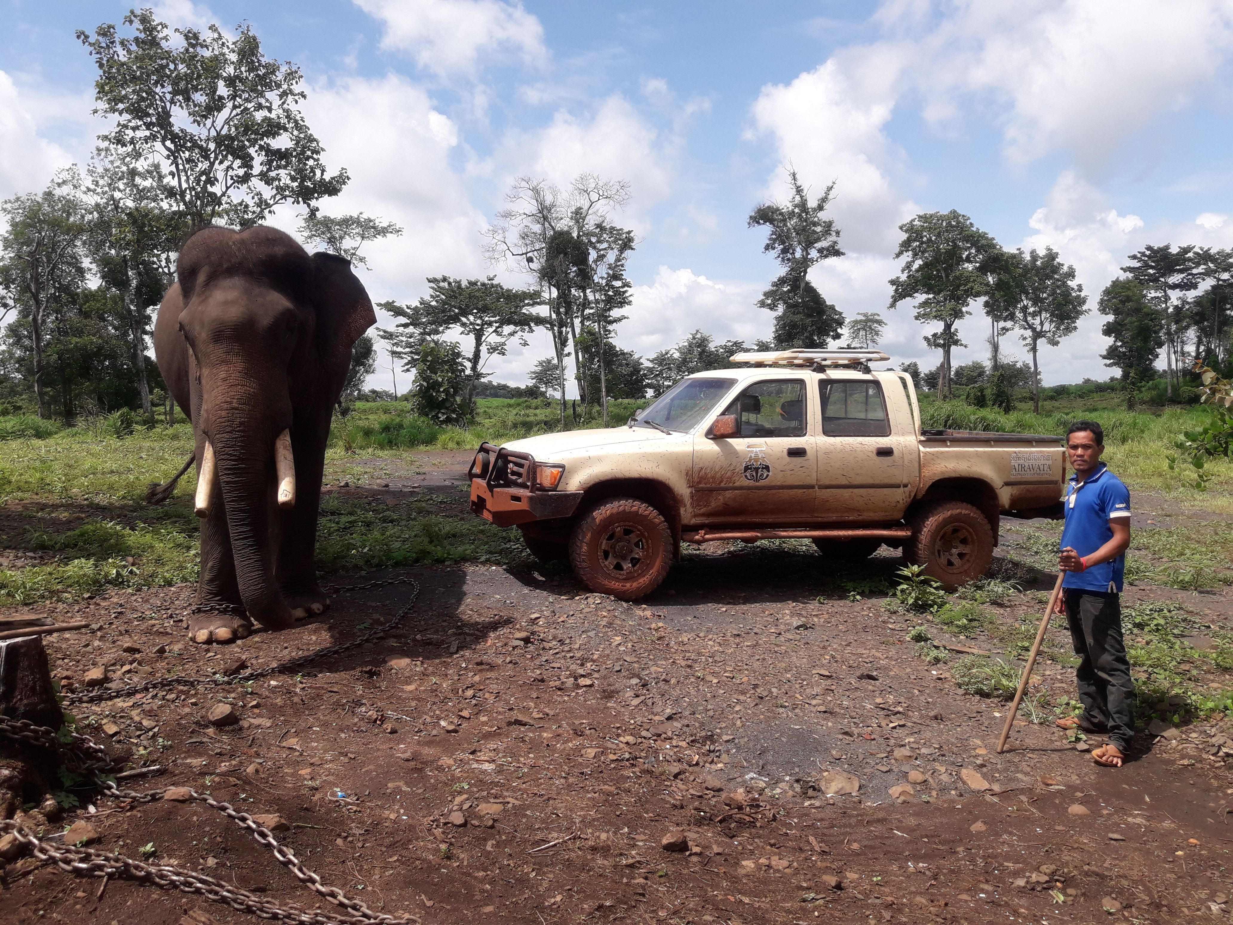 Mahot från Braufolket med elefant och jeep från Airavata Foundation